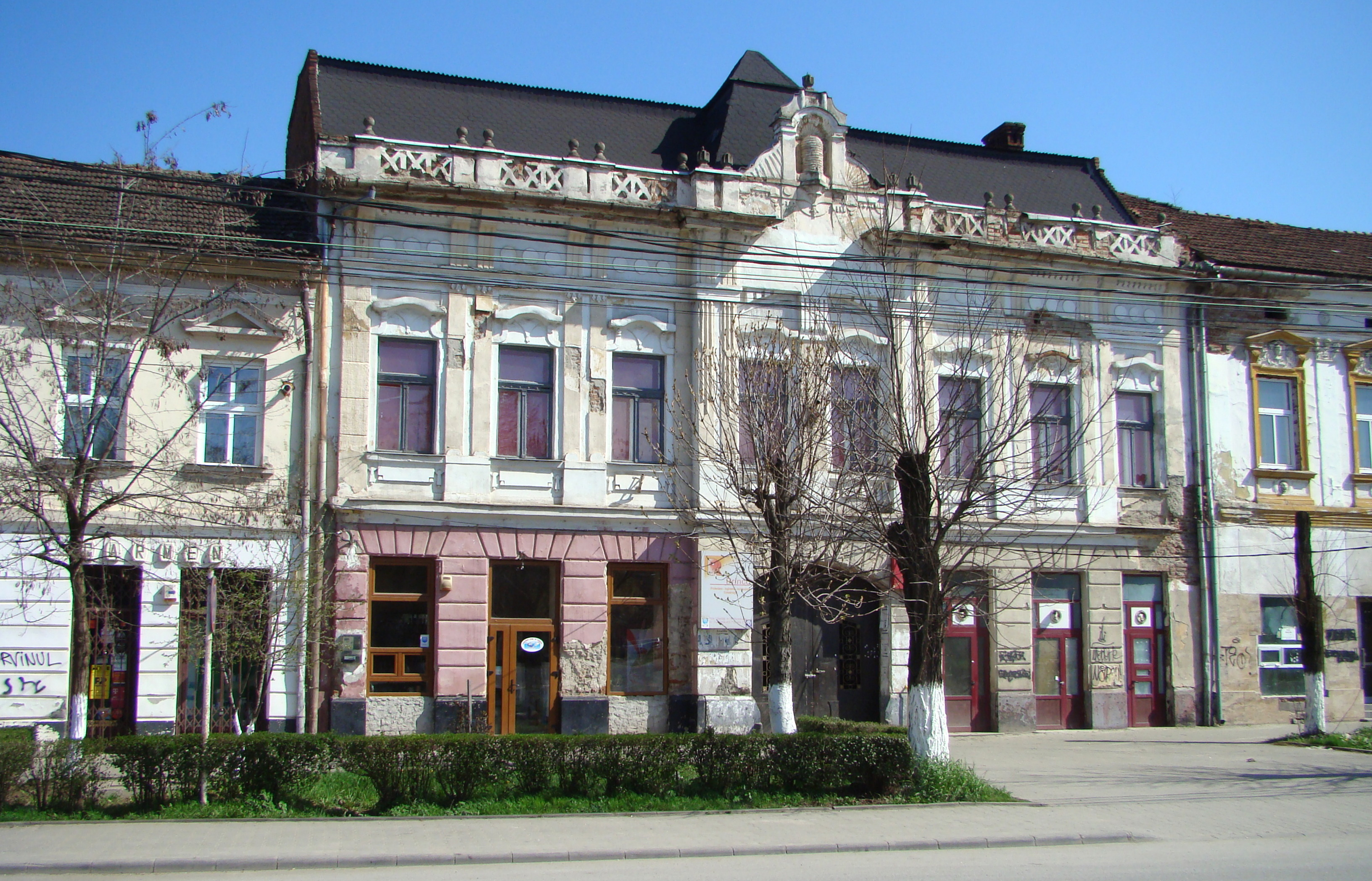 Ansamblul urban „Piața Libertății”, municipiul Hunedoara